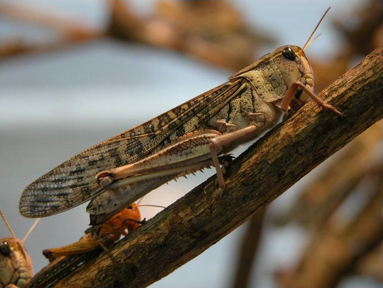 Wanderheuschrecke